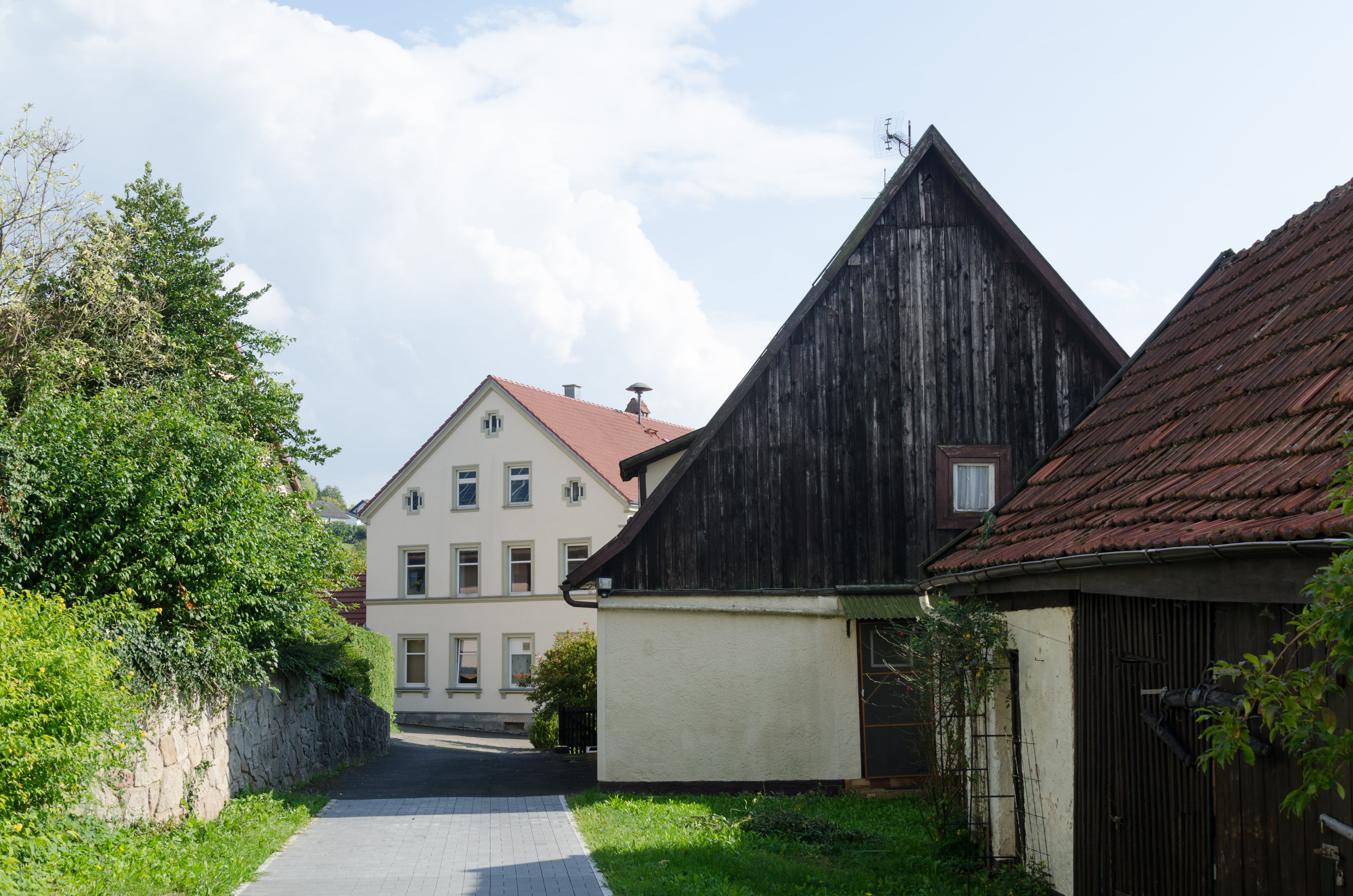 Geroda, Kirchberg 3